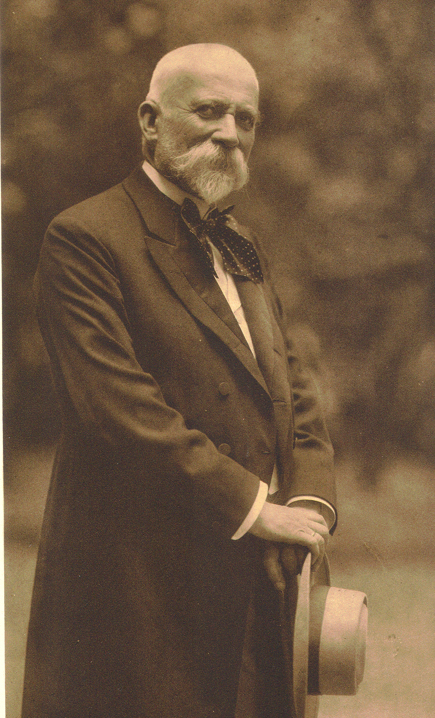 Arnold Otto Meyer (1825–1913), Hamburger Kaufmann, MdHB